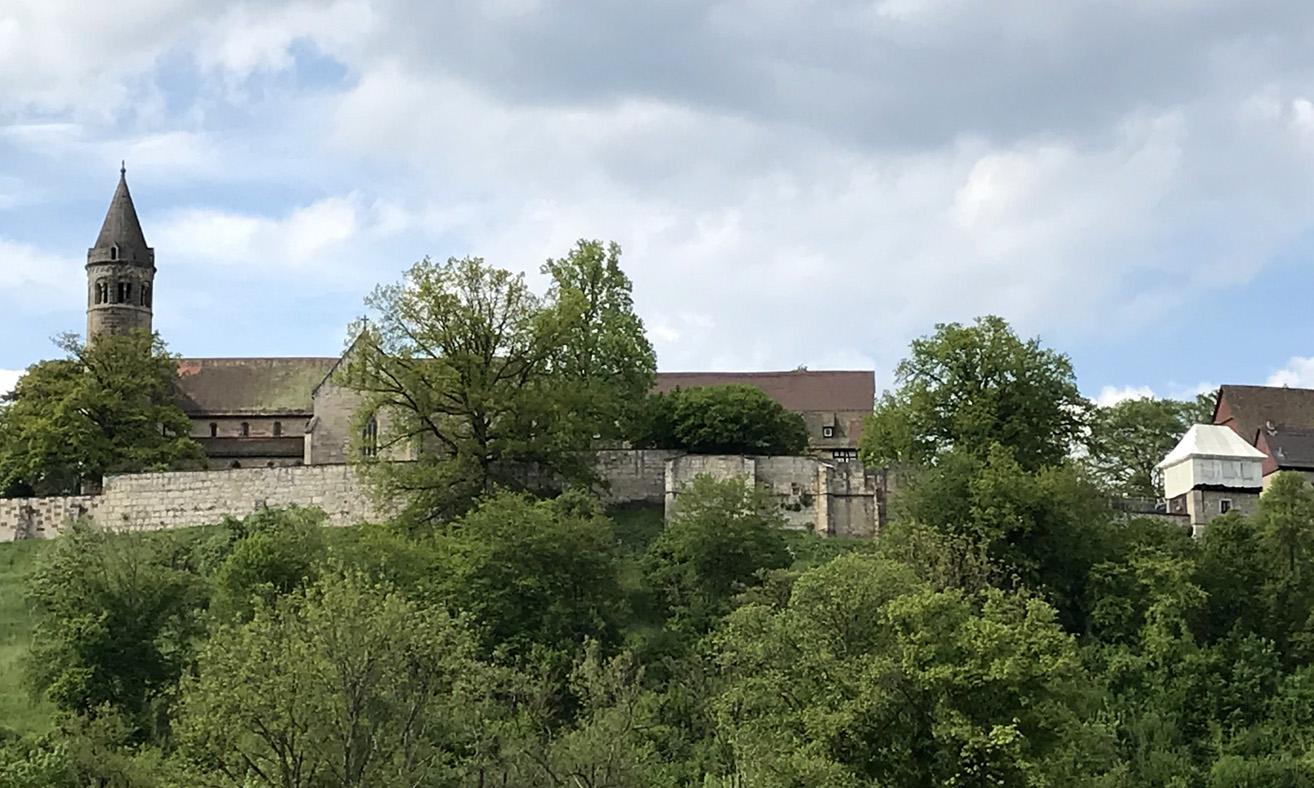 Kloster Lorch während der Remstal Gartenschau 2019. Das „Luginsland“ ist mit einem weißen Nylonüberwurf bedeckt. Die Installation entstand als Station 5 der „16 Stationen“ der Remstalgartenschau 2019.